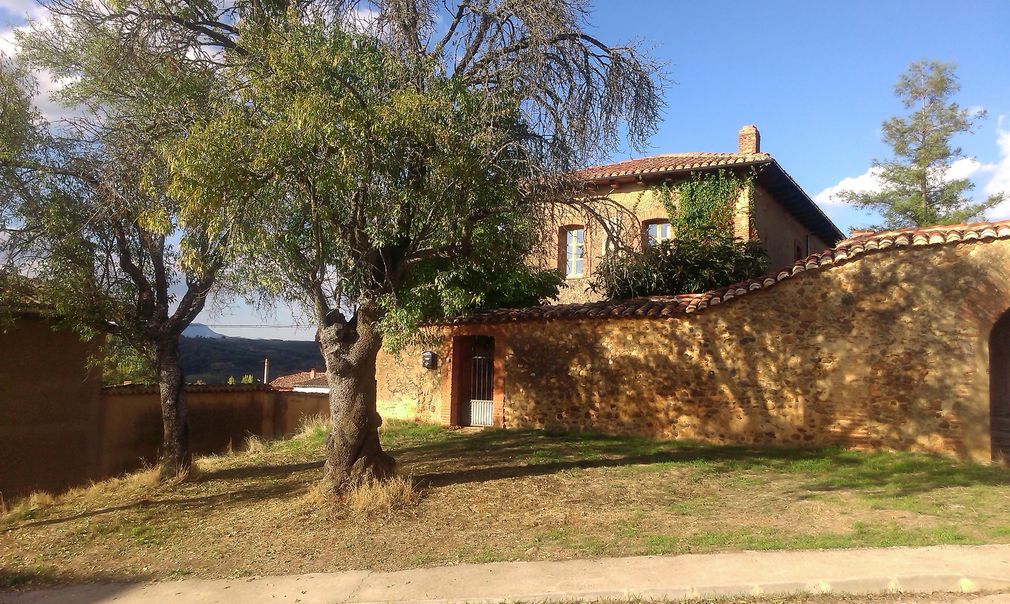 Casa Palacio Canalejas